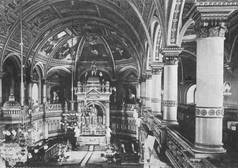 Intérieur de l'église, Arthabaska, QC, vers 1910